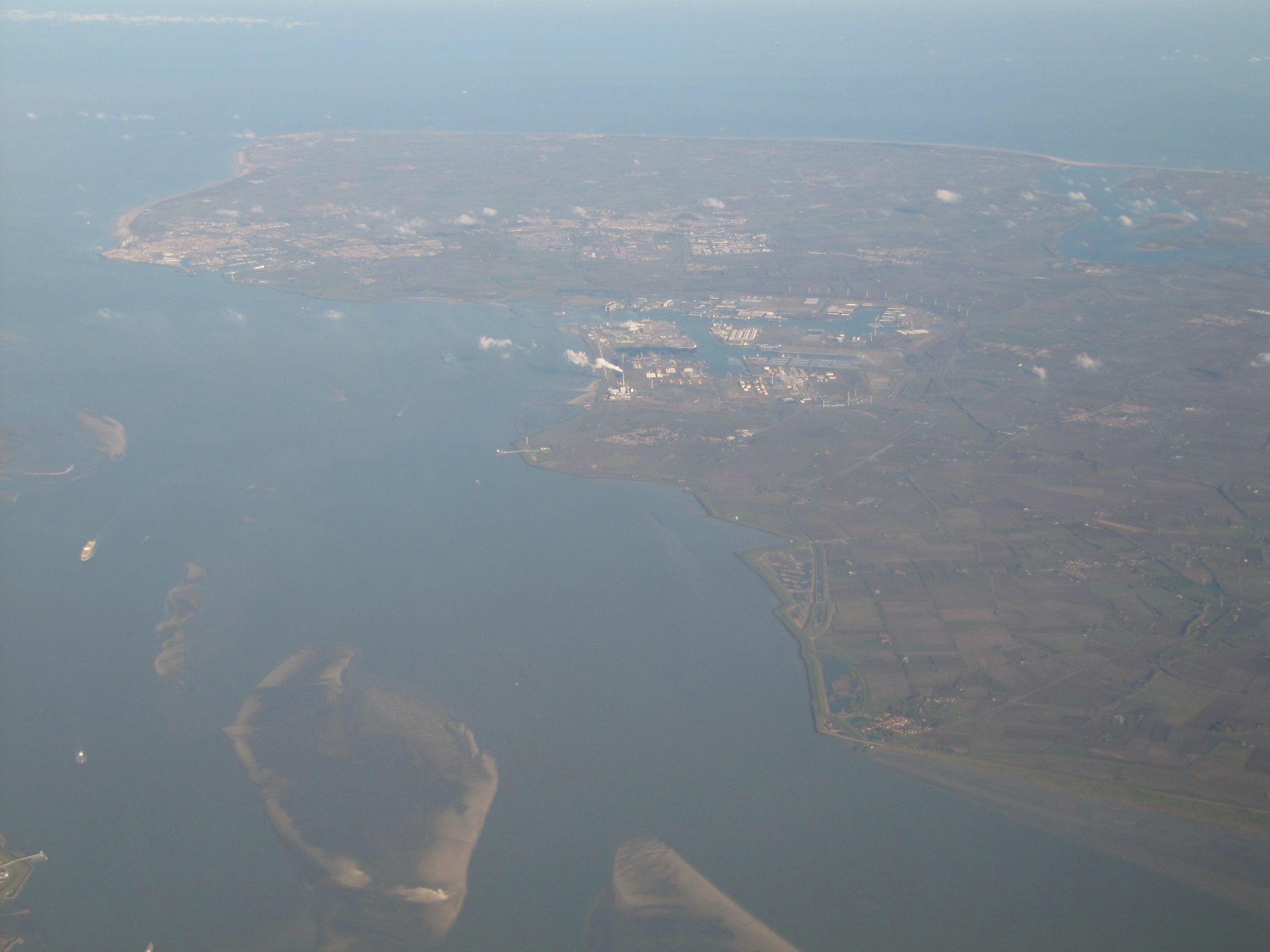 Walcheren